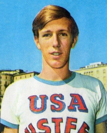 SPORT VEDETTES-PANINI 1974-Figurina n.26- STONES - USA -ATLETICA LEGGERA-Rec